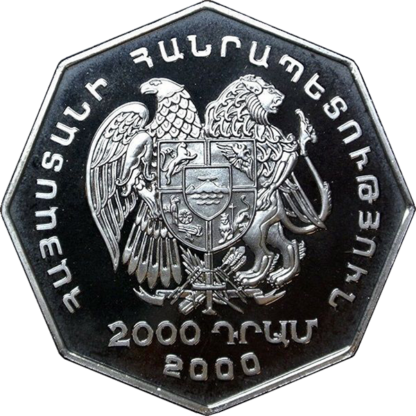 Памятная монета Армении 2000 года "Миллениум" - 2000 драм - серебро 925